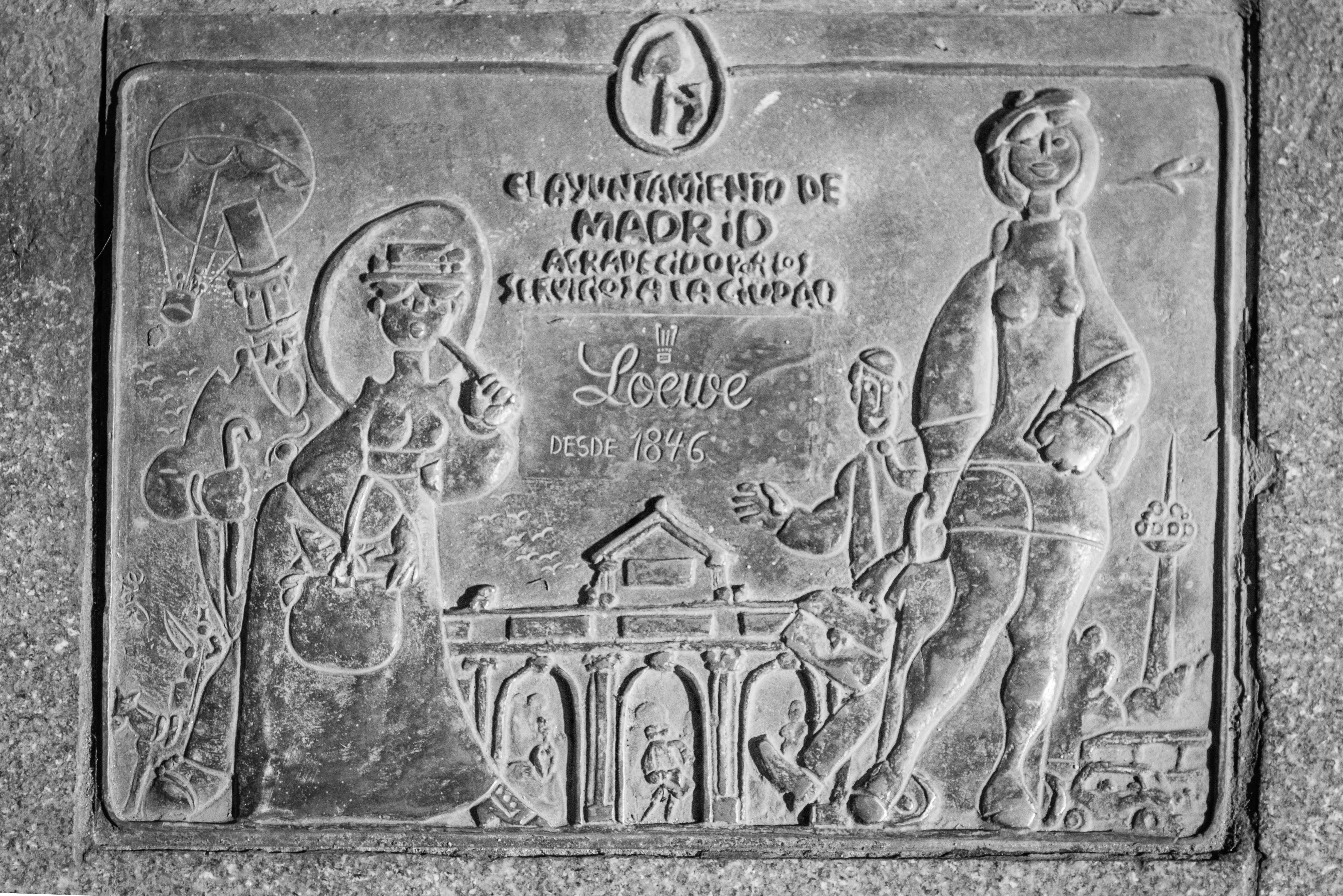 Gully in Madrid